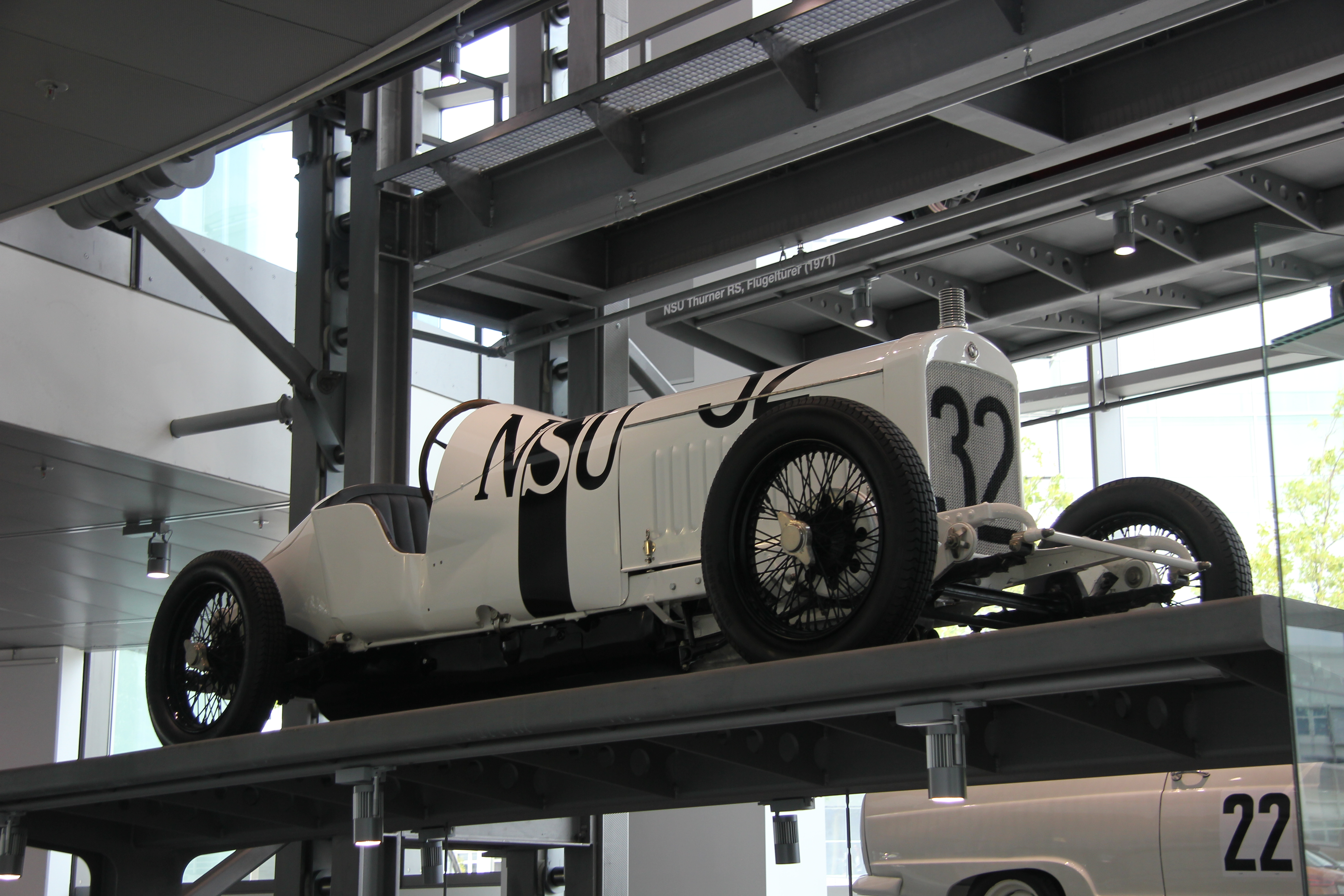 NSU 6/60 PS, Baujahr 1926. Rennsport-Zweisitzer mit 6-Zylinder-Motor und Roots-Kompressor, 1482 cm³, Höchstgeschwindigkeit ca. 175 km/h